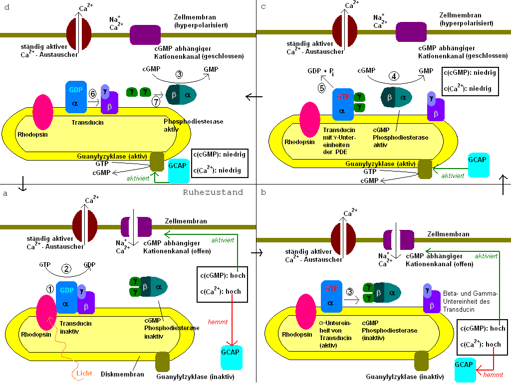 Visuelle Signaltransduktion